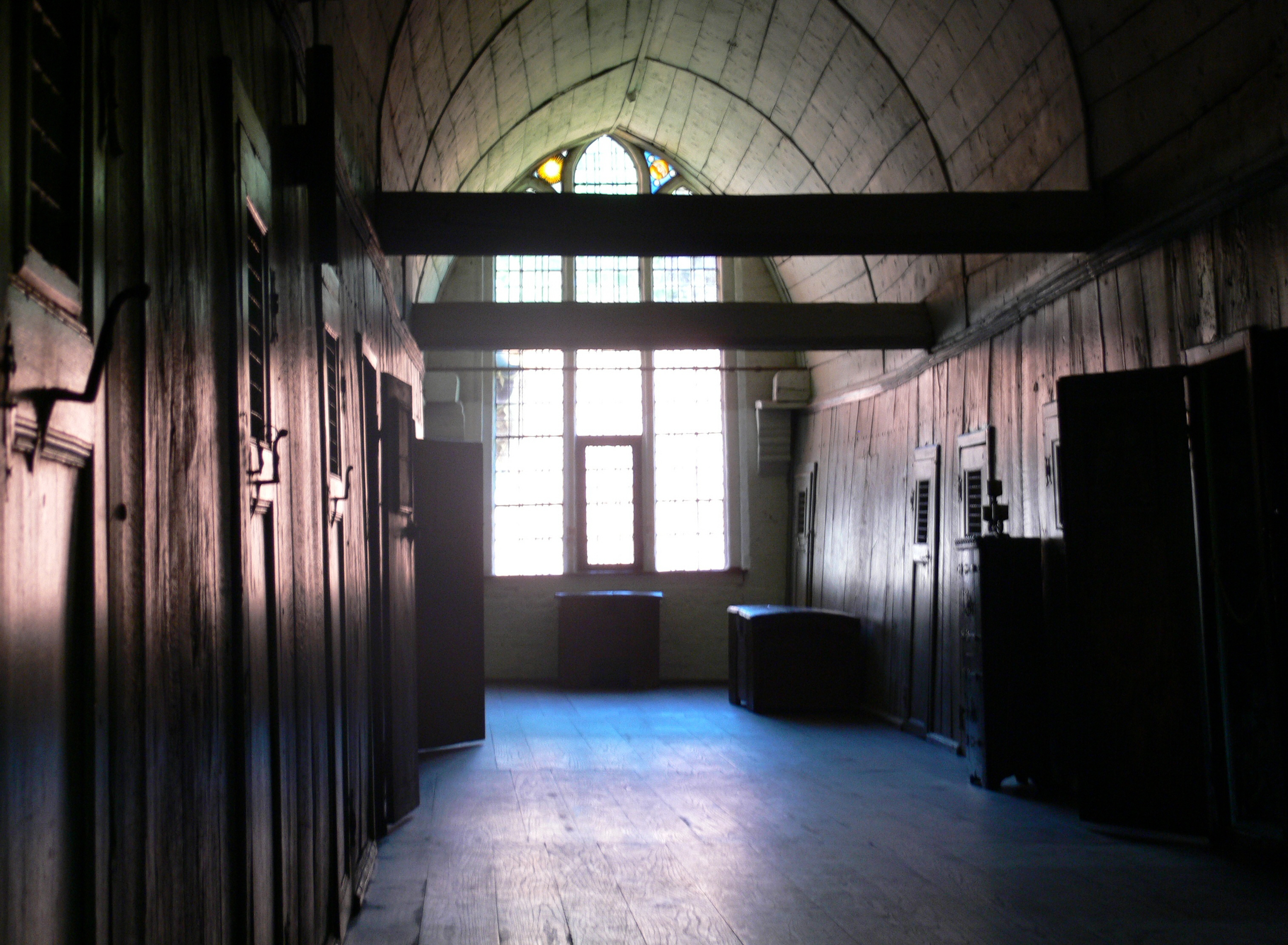 Kloster Lüne in Lüneburg Gang im Dormitorium mit den nachreformatorischen Konventualinnenzellen